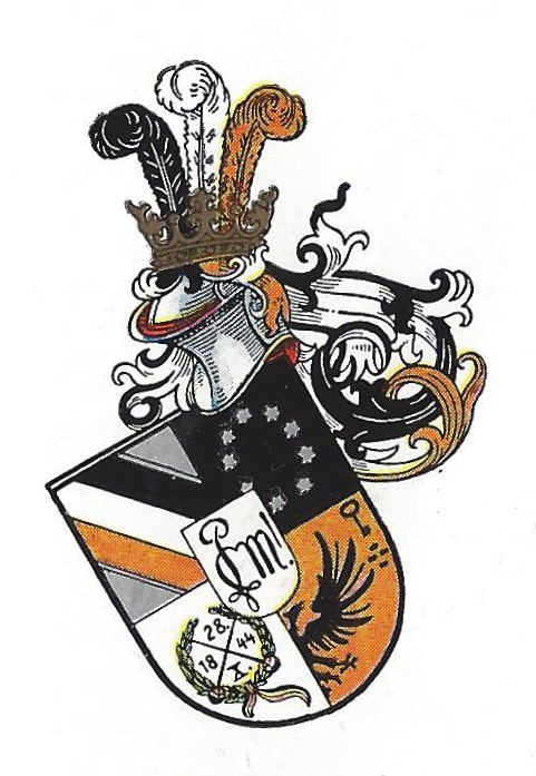 Studentenwappen des Corps Palaiomarchia Halle